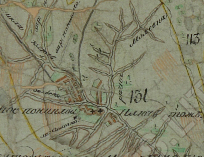 Село Рождественское (Пониклой ключъ тожъ) на двухверстной карте Симбирской губернии Сызранского уезда 1806 г.